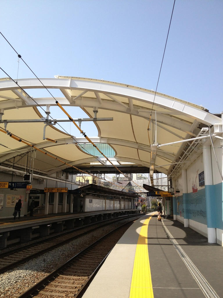 2013年3月撮影